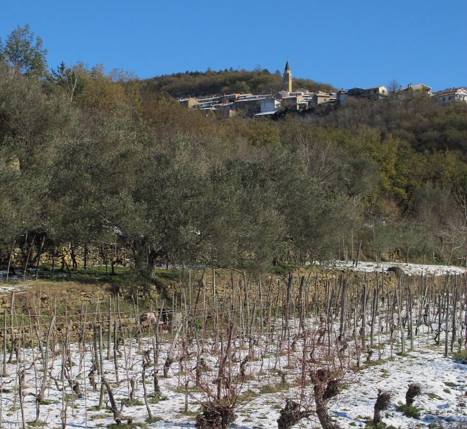 Caresana, frazione del comune di San Dorligo della Valle (TS)